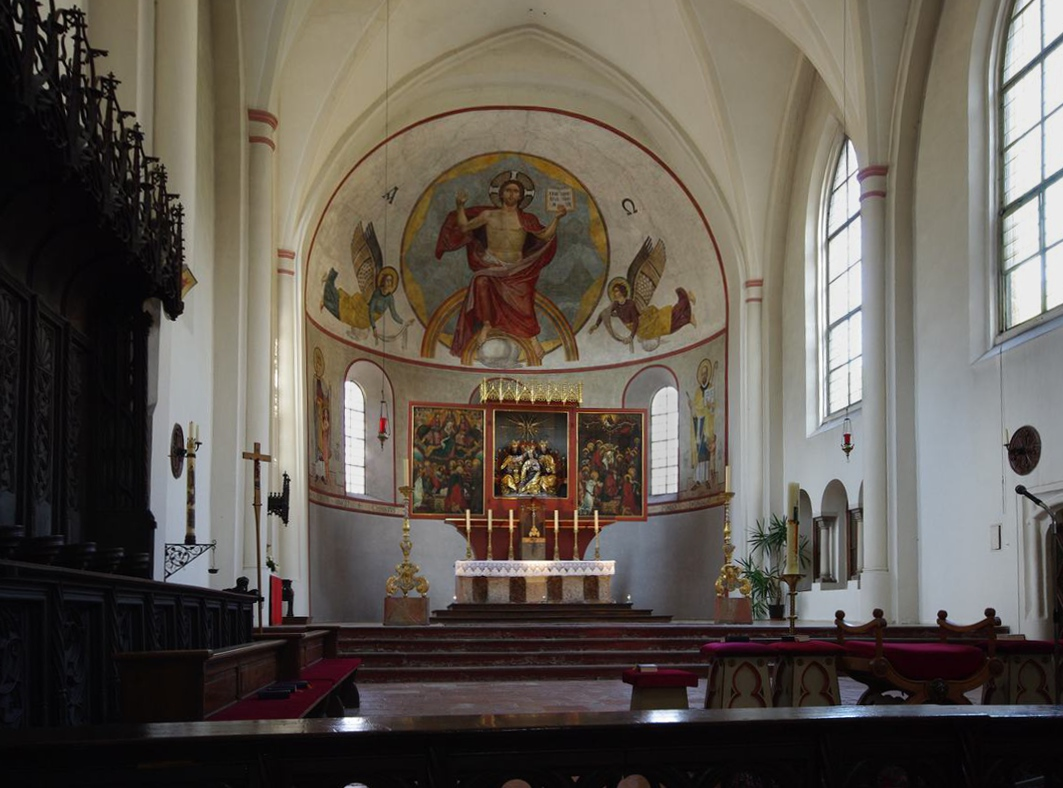 Salzburger Str. 32, 83435 Bad Reichenhall, Münster St. Zeno Genehmigung für Innenaufnahmen durch Erzbischöfliches Ordinariat München, Ressort Bauwesen und Kunst vom 21.08.2012 liegt schriftlich vor.This is a photograph of an architectural monument.